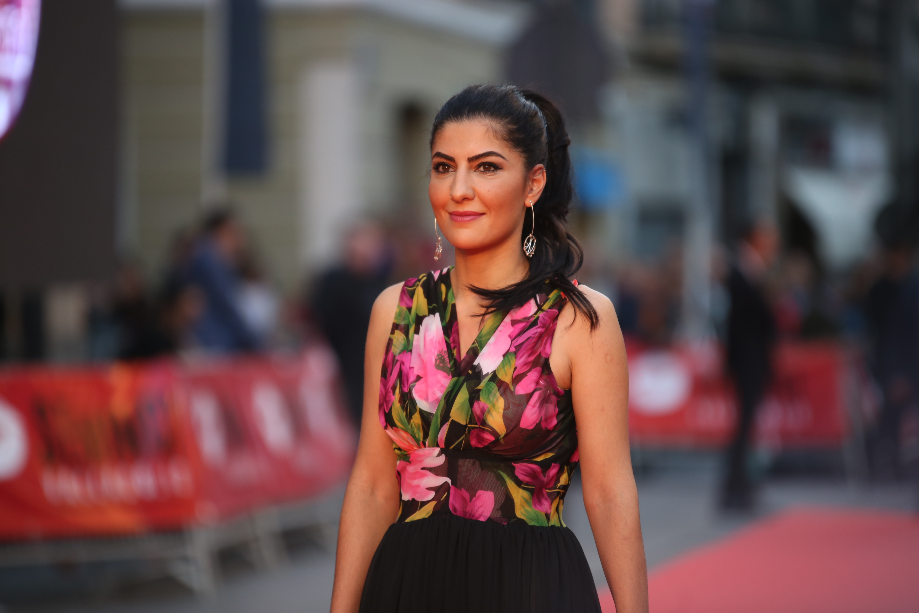 Seminci 2016